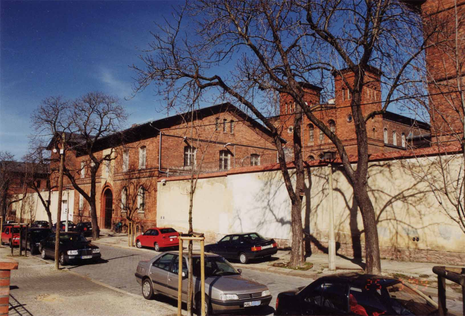 Gefängnis/ JVA "Roter Ochse", Halle (Saale), Am Kirchtor 20